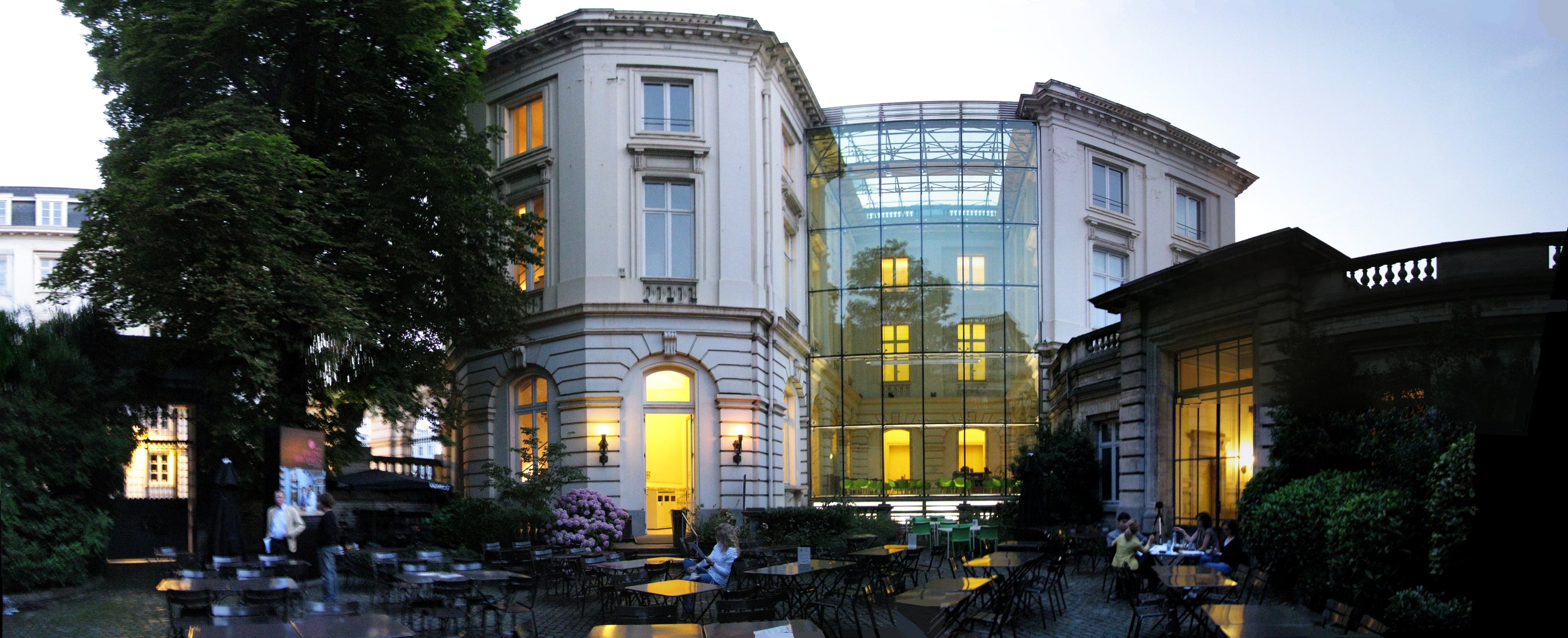 Bruxelles Musée BELvue, coté jardin en nocturne